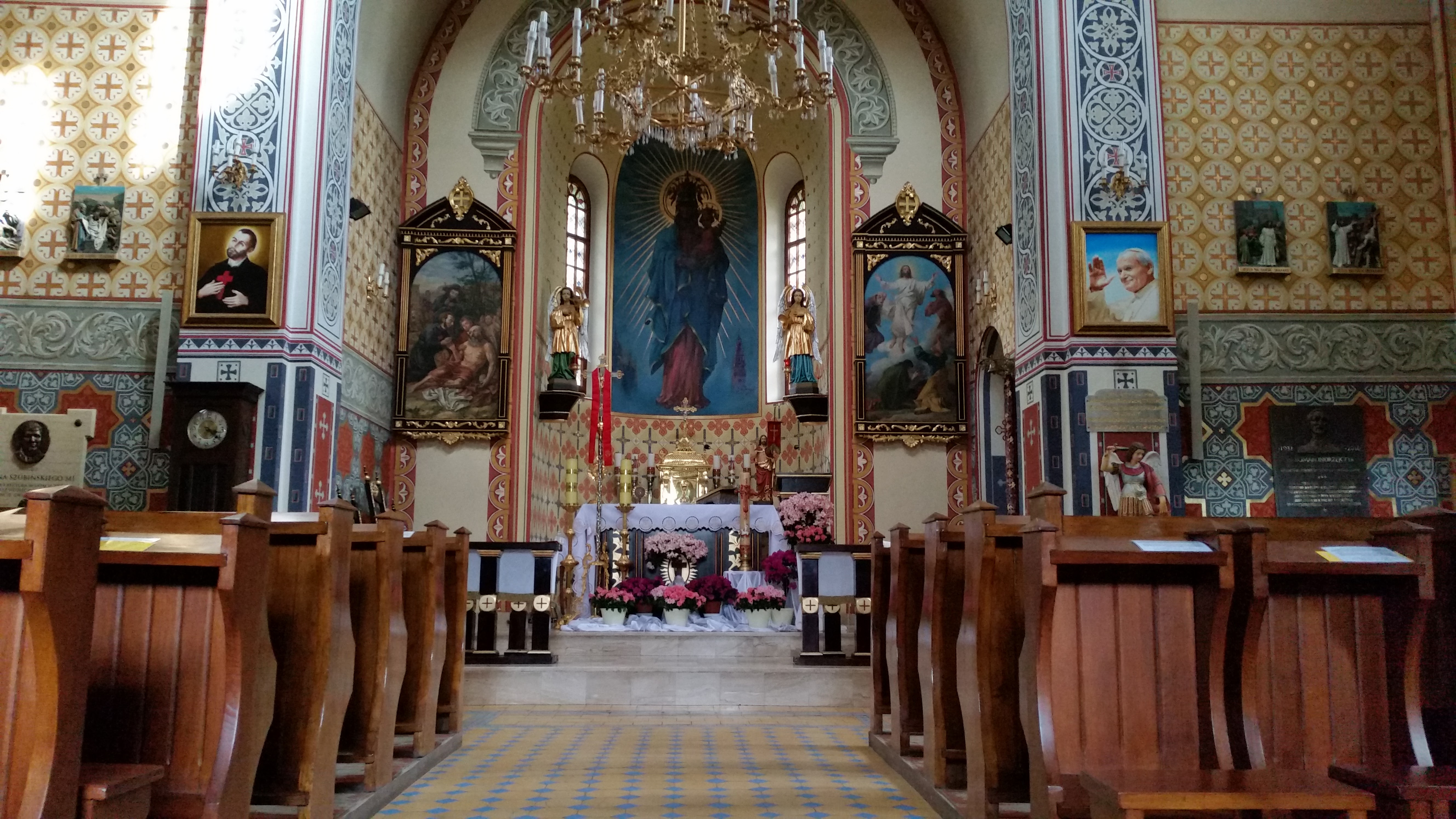 Kościół Przemienienia Pańskiego w Pruszkowie wewnątrz